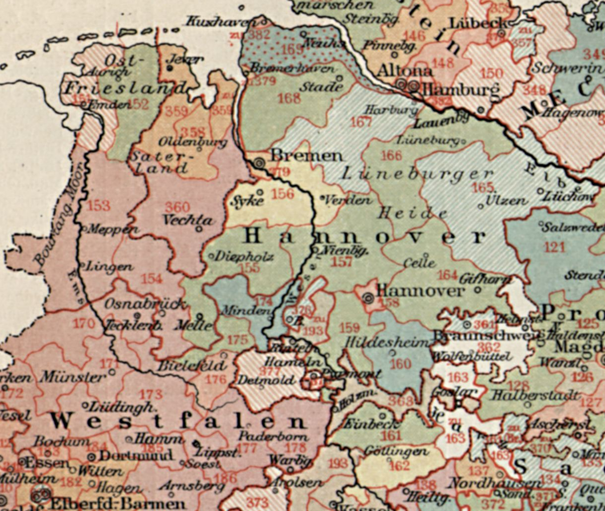 Reichstagswahlkreise Provinz Hannover Stand 1909